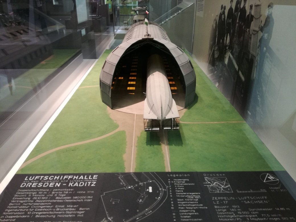 Modell des Zeppelins LZ 17 "Sachsen" in der Luftschiffhalle des ehemaligen Flugplatzes Dresden-Kaditz im Verkehrsmuseum Dresden.